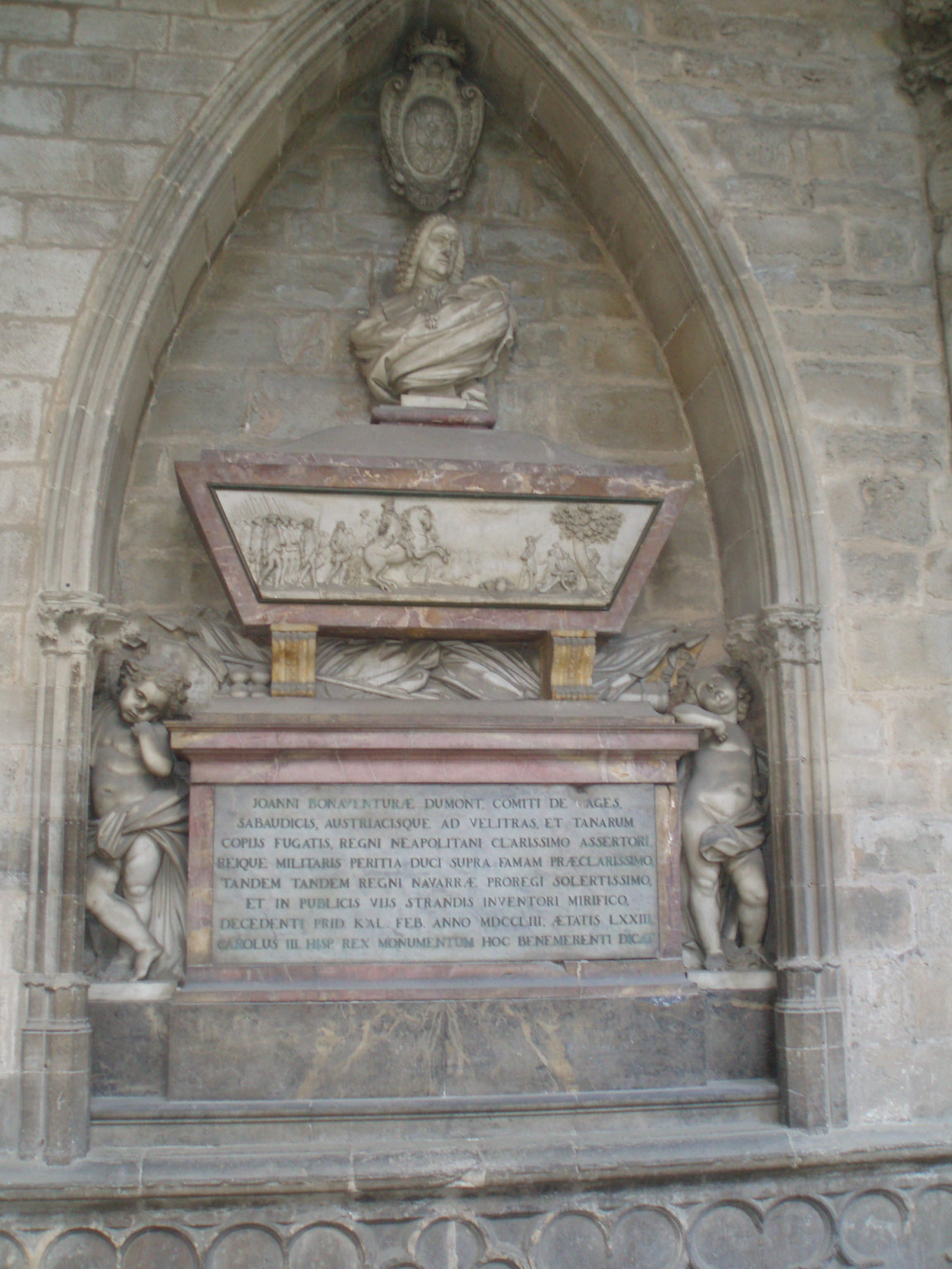 Sepulcro del general Juan de Gages, conde de Gages, capitán general y virrey de Navarra (1682-1759). Se encuentra en el claustro de la Catedral de Pamplona. Navarra, (España).